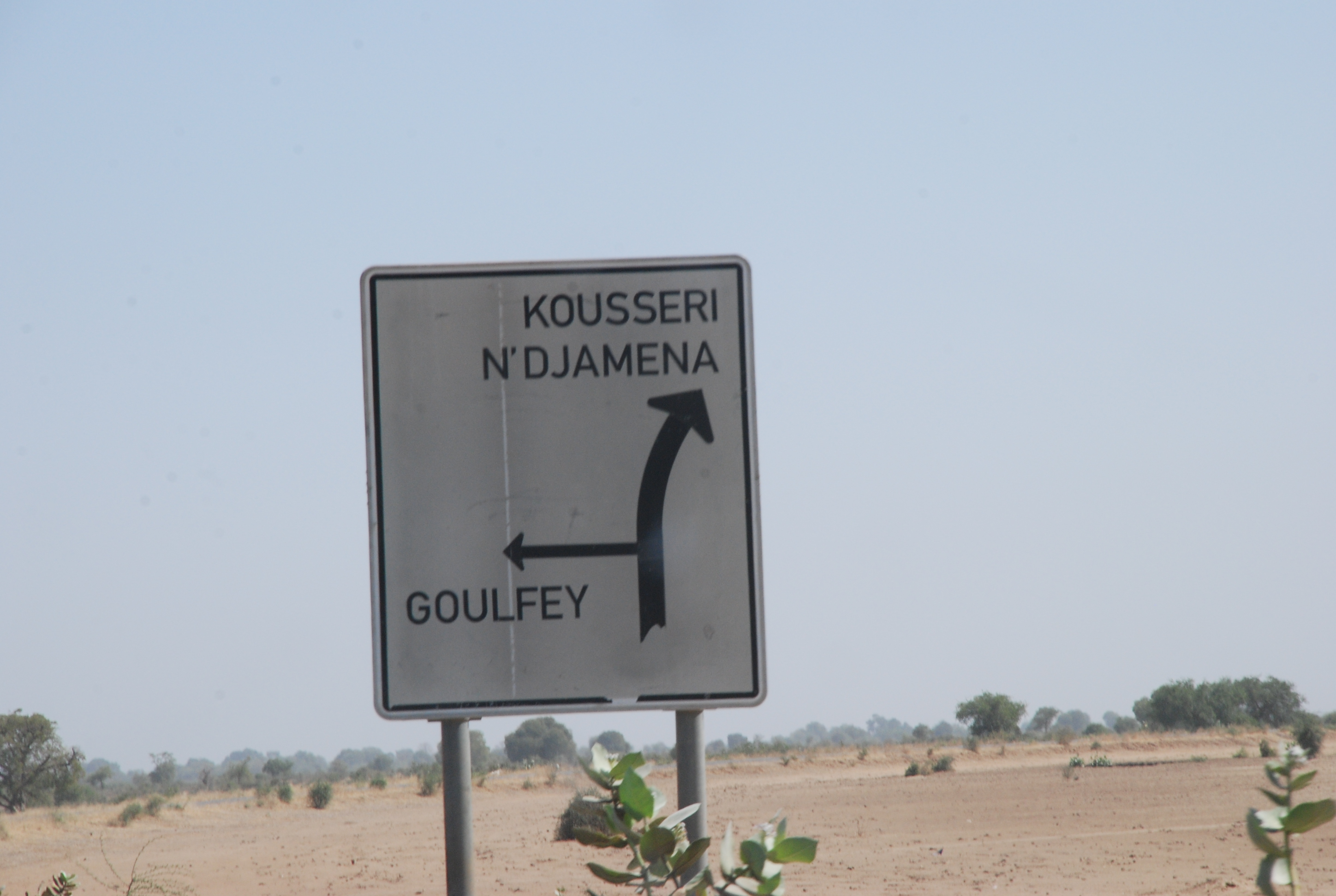 Panneau de signalisation situé dans le nord du Cameroun et indiquant les villages du nord et le Tchad This is an image with the theme "Africa on the Move or Transport" from: Cameroon